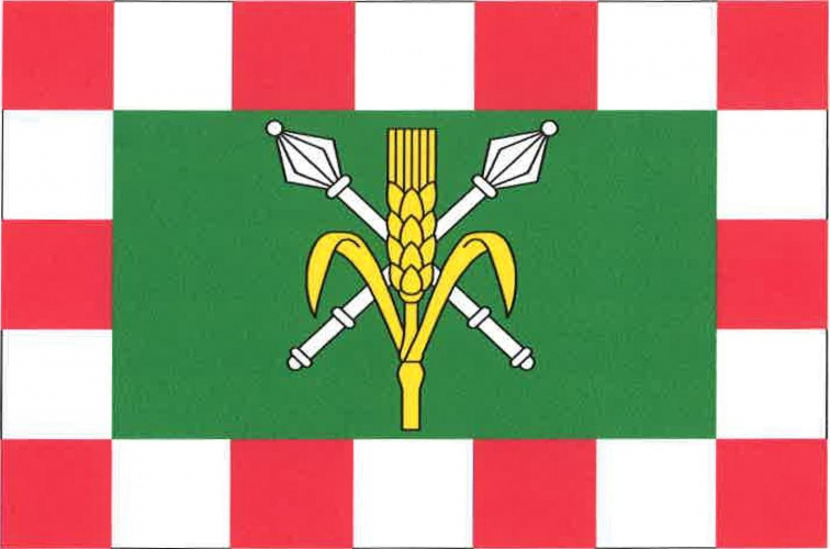 vlajka, Třebeň, okres Cheb